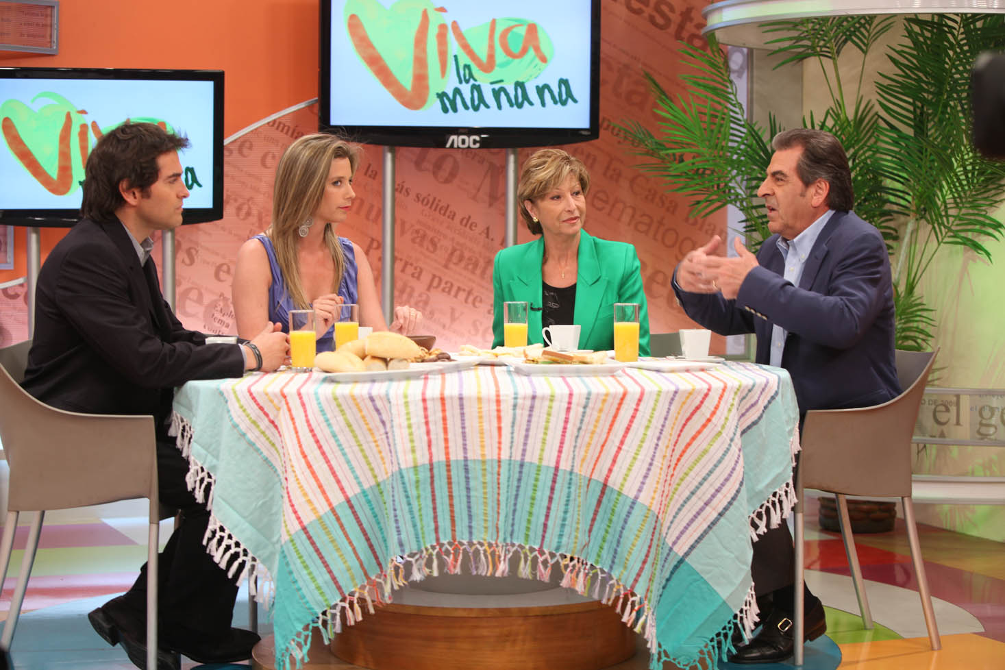 El candidato visitó con Martita el programa de canal 13.